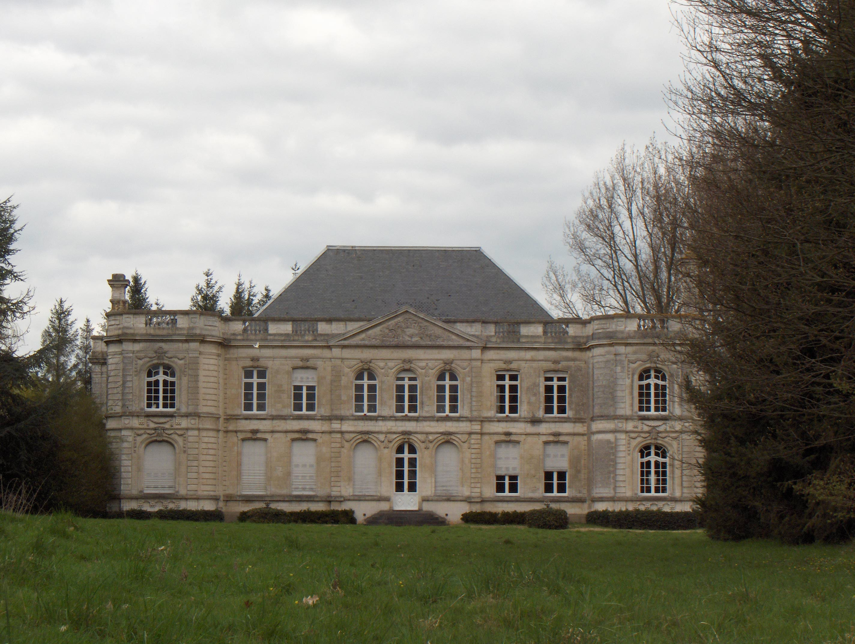 Clarques (Frankreich, Dept. Pas-de-Calais), Schloss am Ostrand des Dorfes aus 1775 (im 20. Jh. erweitert).